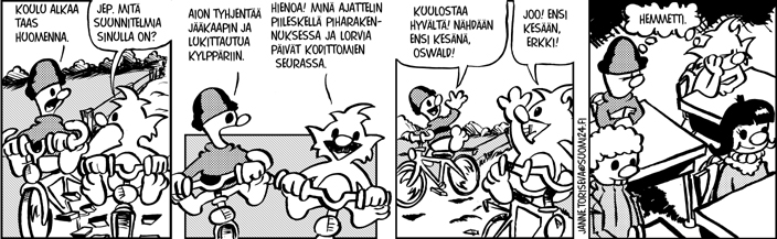 Ensimmäinen Oswald-strippi. Tätä kuvaa saa käyttää Creative Commonsin Nimi mainittava 2.5 -käyttöoikeussopimuksen mukaisesti